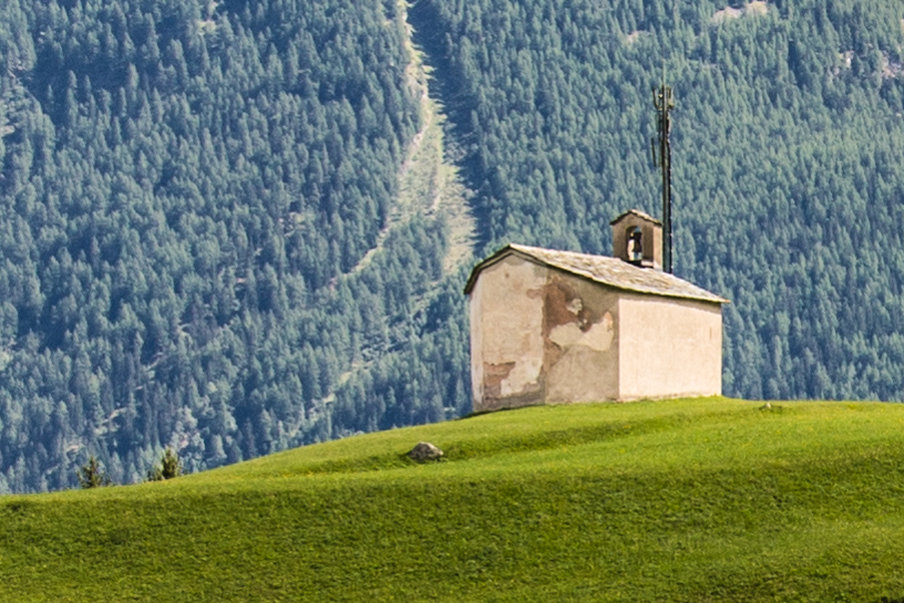 Chiesa evangelica riformata